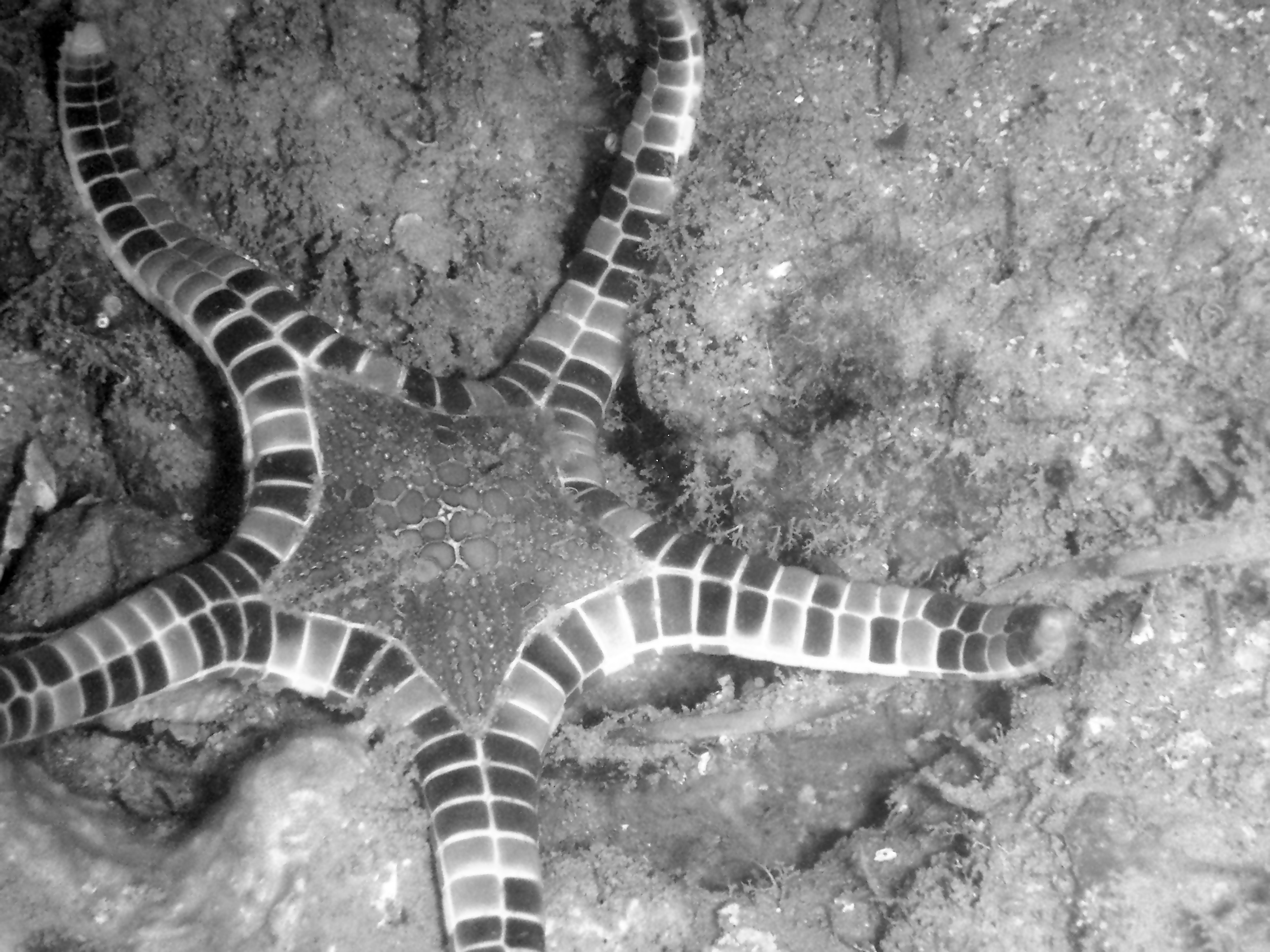 Icon Seastar, Pulau Hantu, Singapore